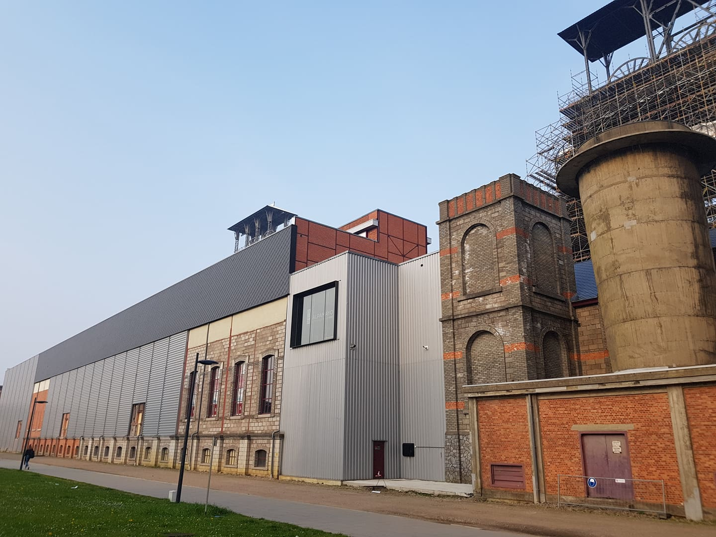 De overdekte klimhal Alpamayo in de oude elektriciteitscentrale van de Koolmijn van Beringen.